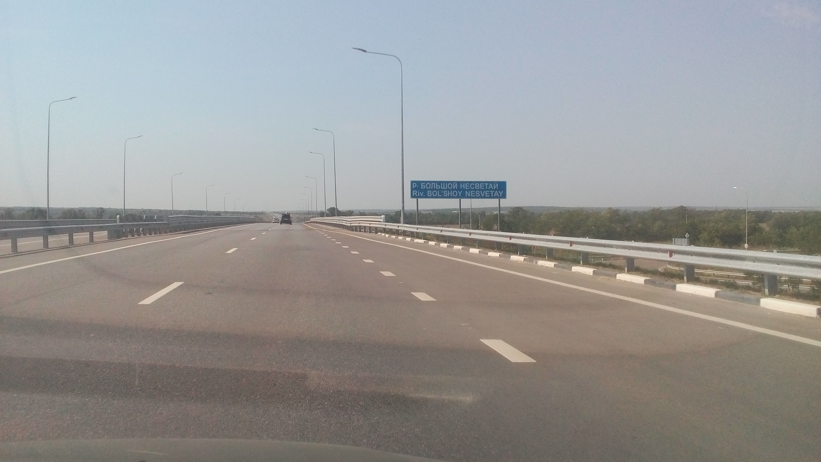 Указатель на реку Большой Несветай, Аксайский район Ростовской области